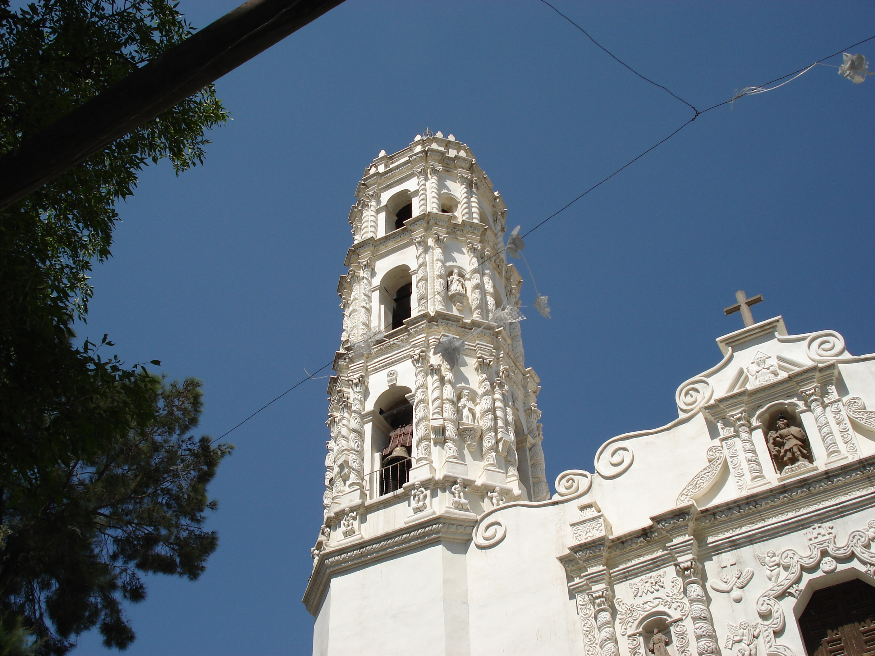 Coatlinchán Church